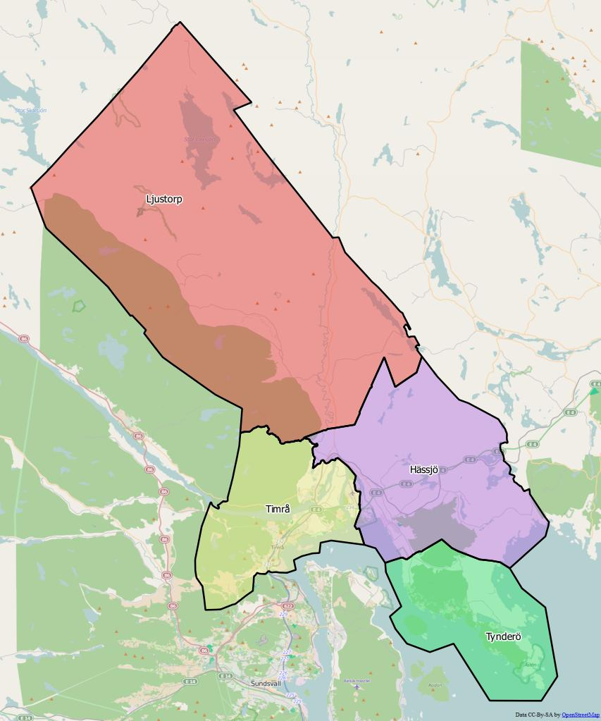 Distriktsindelningen i Timrå kommun World file: 121.15886136780939353 0 0 -121.15886136780939353 1881235.09403984853997827 9070130.09775735624134541